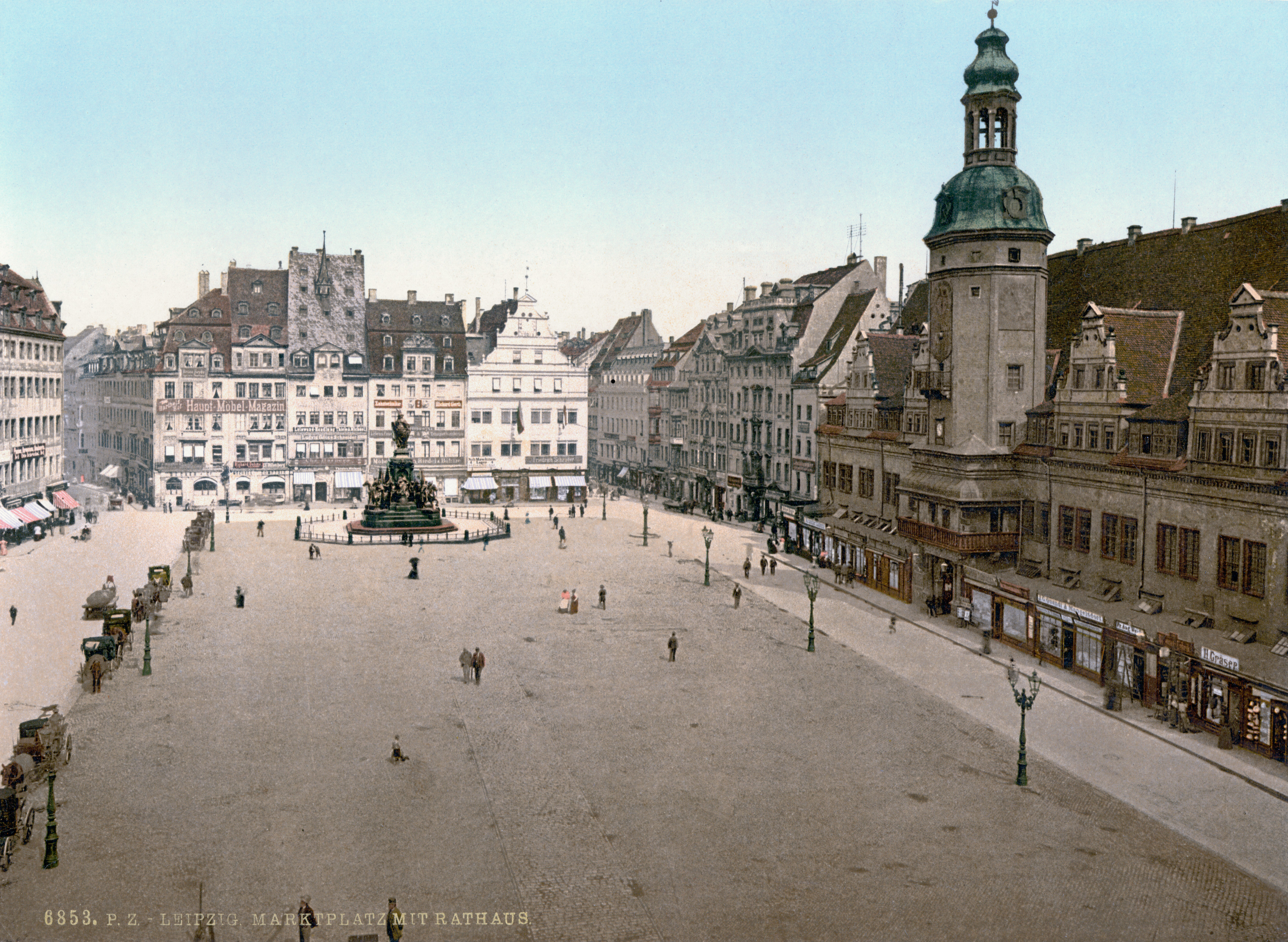 Marktplatz mit Rathaus Leipzig um 1900